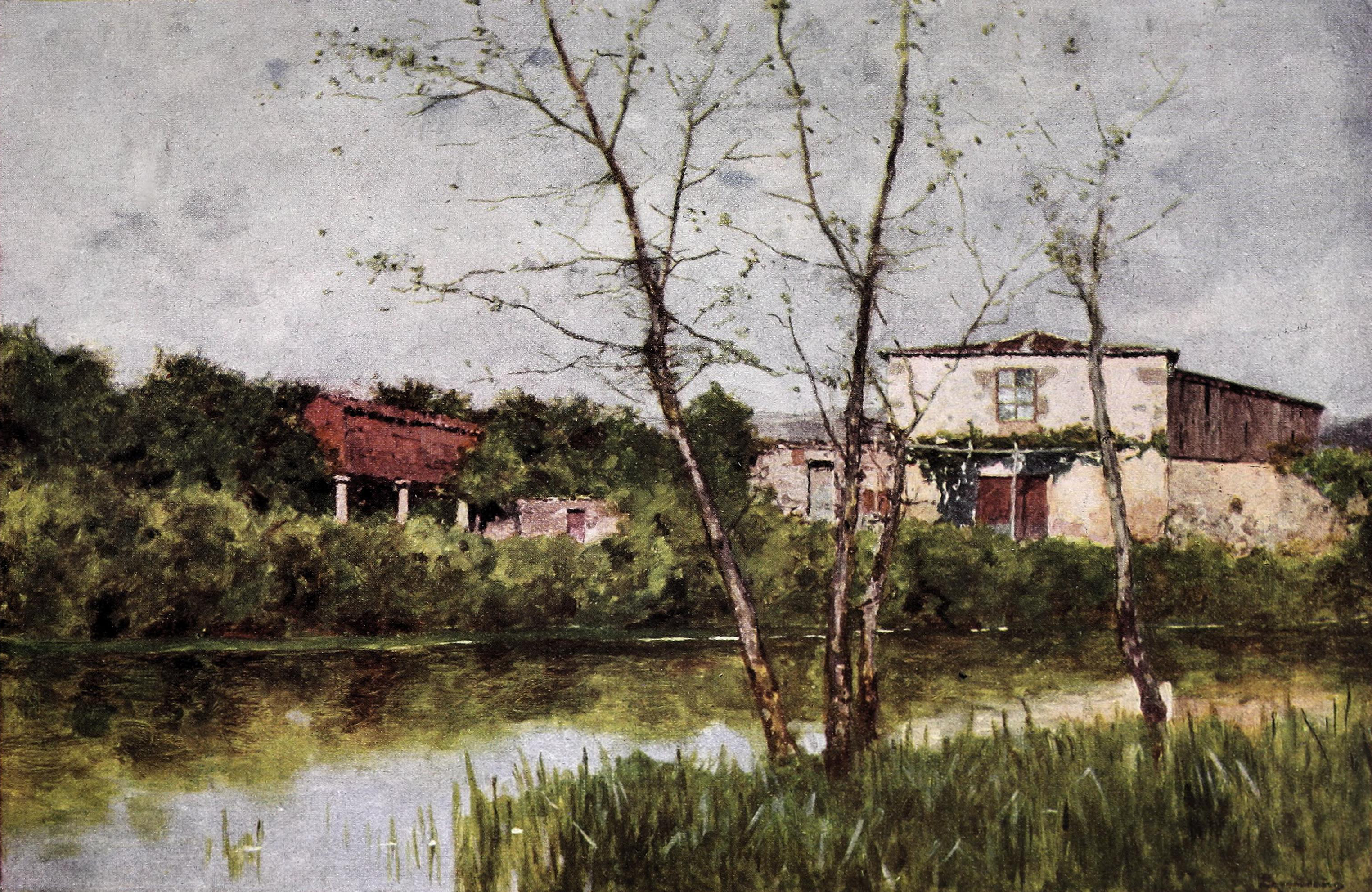 Orillas del Miño.